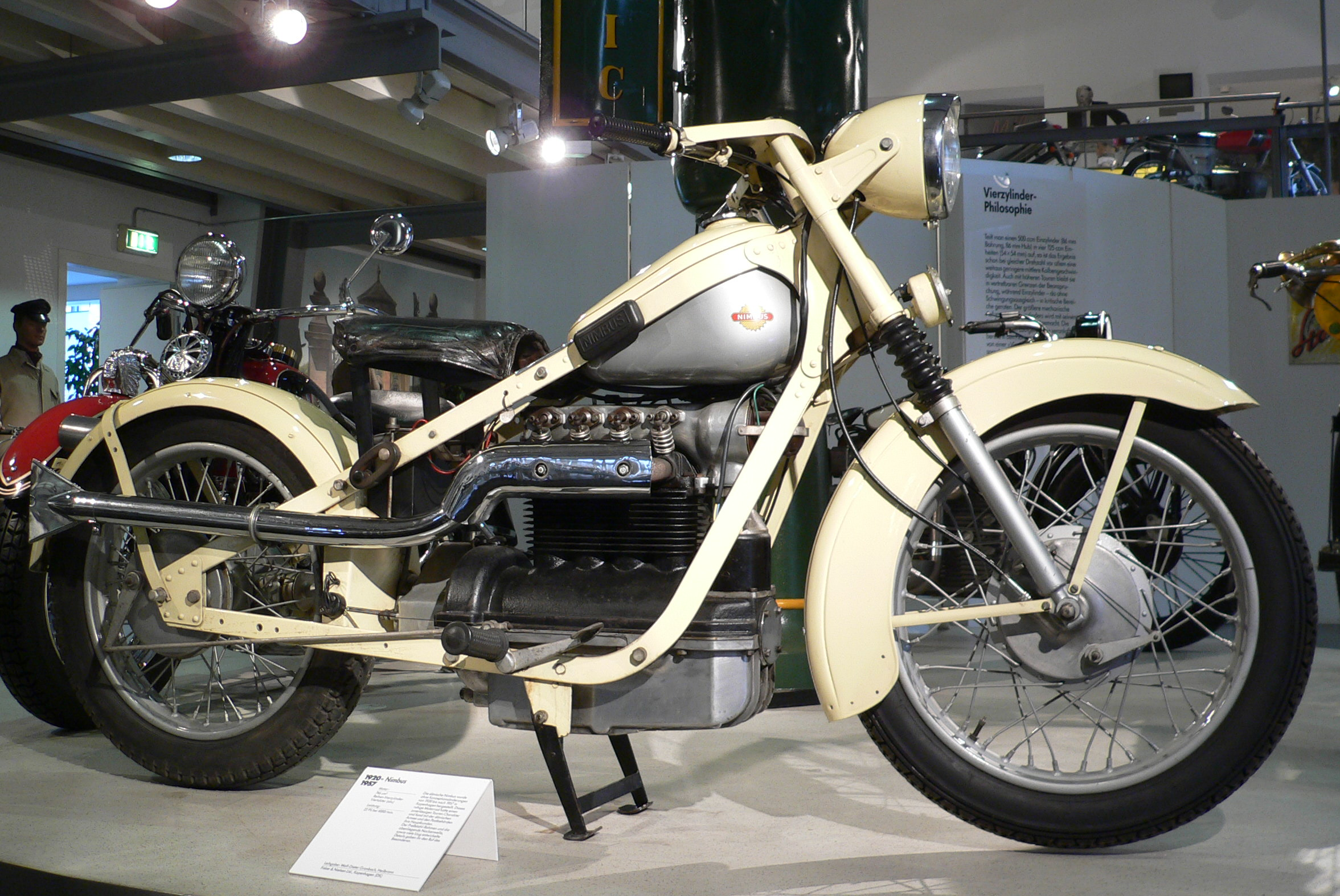 Motorbike "Nimbus MK II" (1932-1957) at the Deutsches Zweirad- und NSU-Museum (746 cm³, Vierzylinder-Reihen-Motor, 22 PS bei 4.000 U/min., 121 km/h)